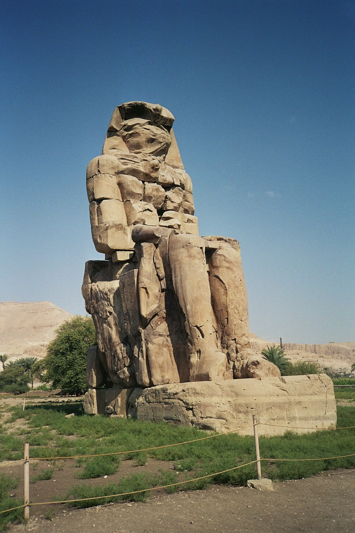 Rechter Kolos van Memnon, Luxor West Bank,Egypte